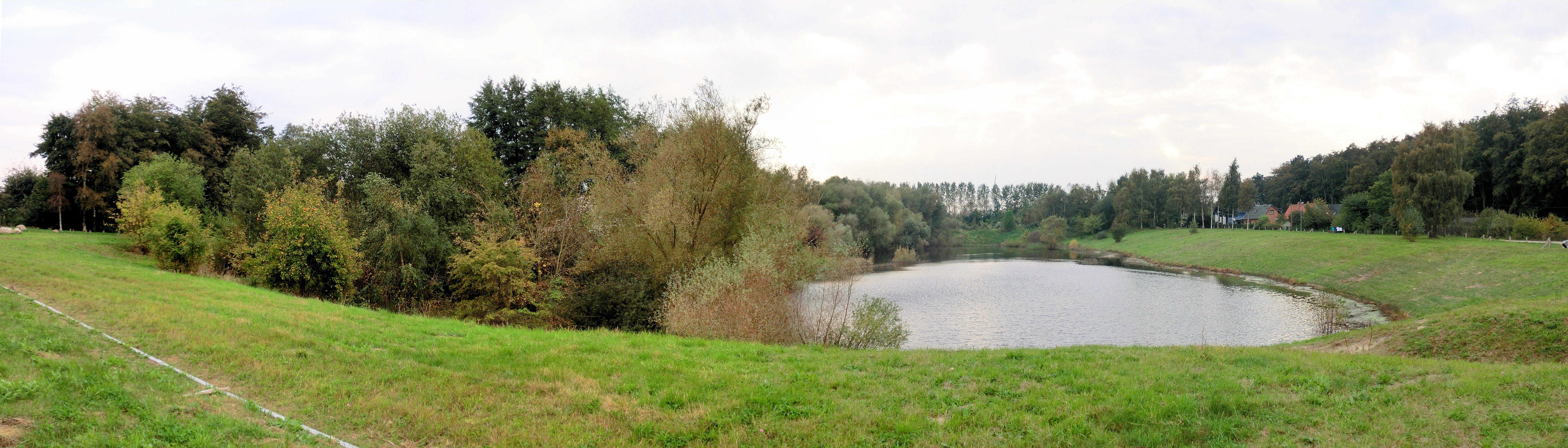 Rostock Diedrichshagen Teich Waldweg